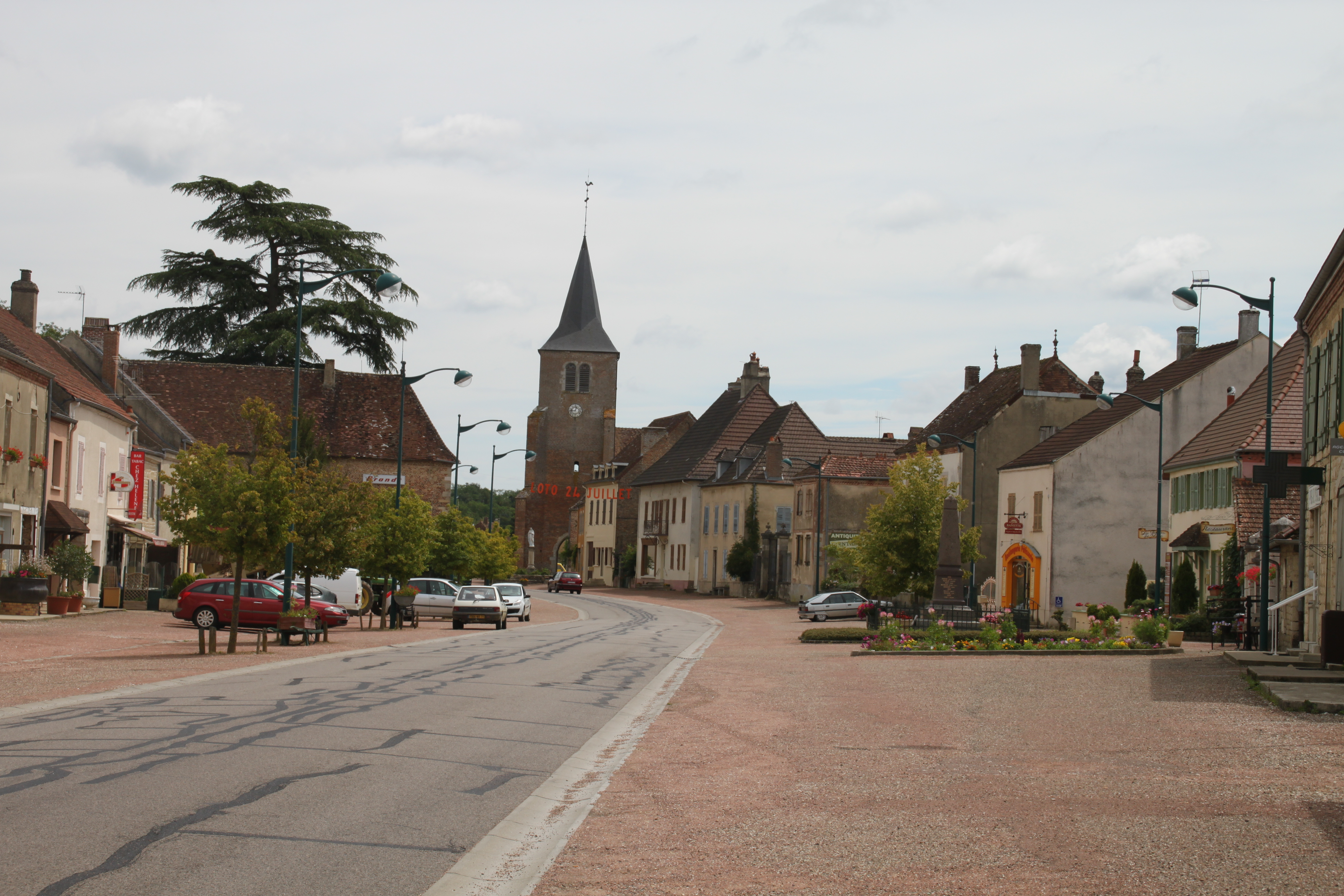 Bellevsvre, Blick entlang der Hauptstrasse in östlicher Richtung